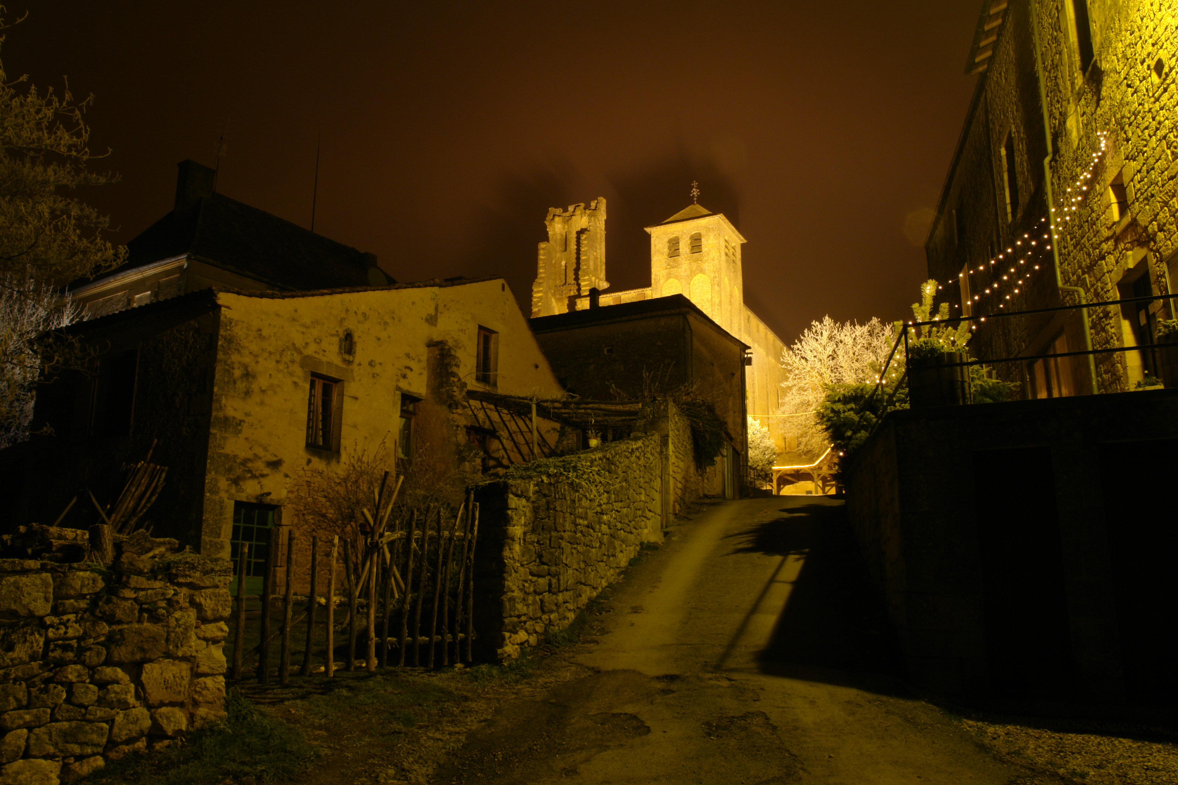 L'abbaye de Saint-Avit-Sénieur la nuit au mois de décembre.